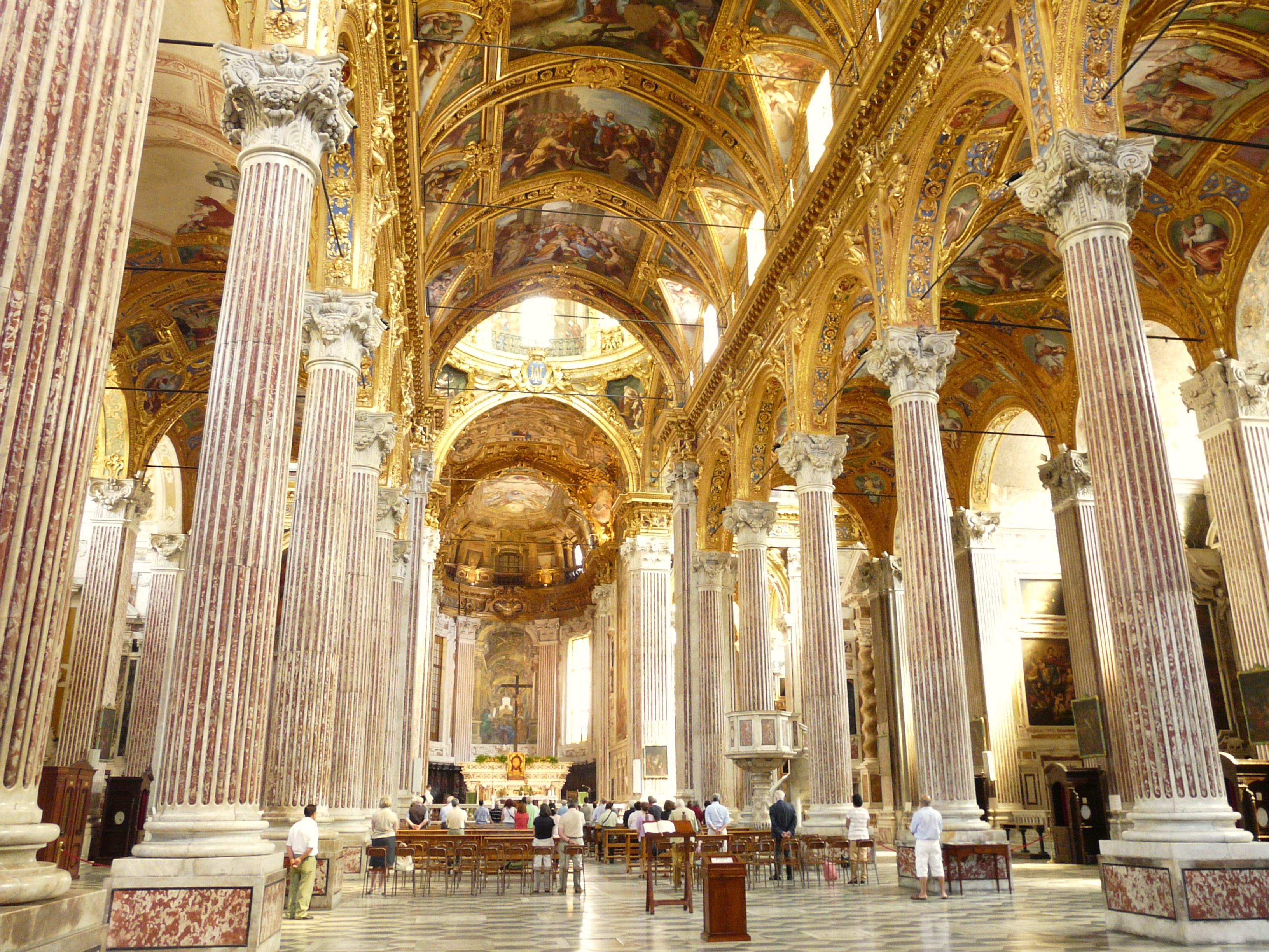 Basilica della Santissima Annunziata del Vastato, Genova, Liguria, Italia